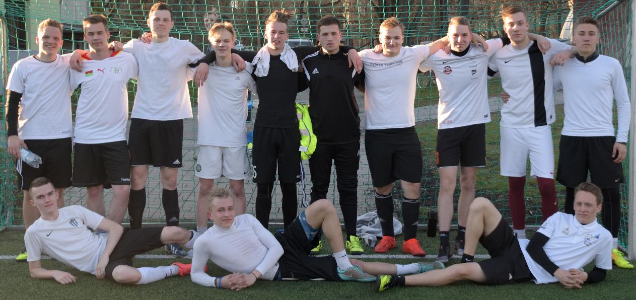 JK 32. KK pärast esimest mängu